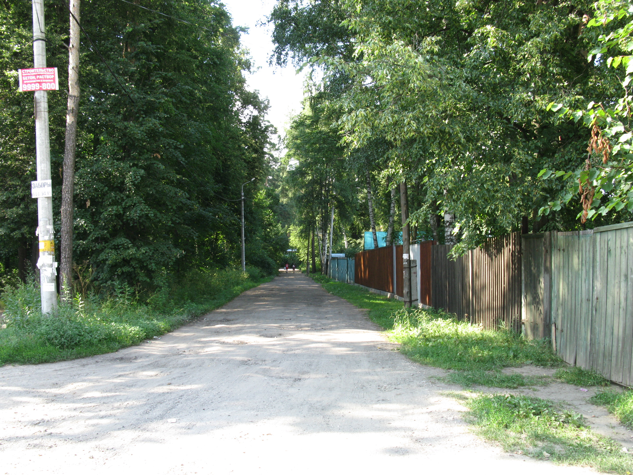 Главная аллея в Черкизовском парке